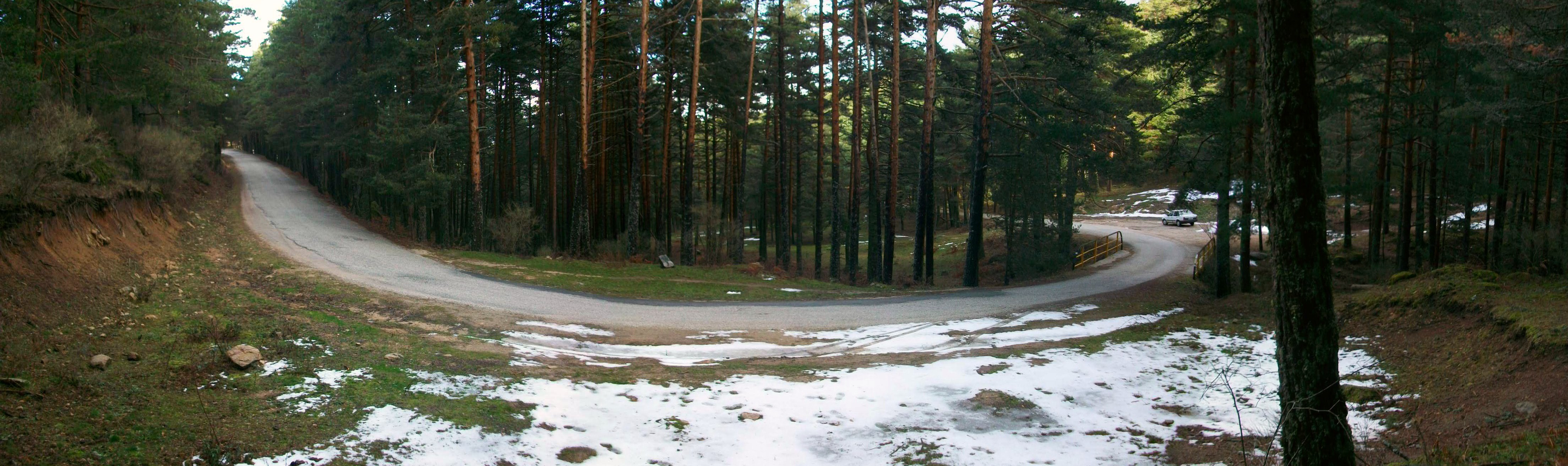 La panorámica muestra una curva muy característica de la carretera forestal que une las localidades segovianas de San Rafael y El Espinar (España).